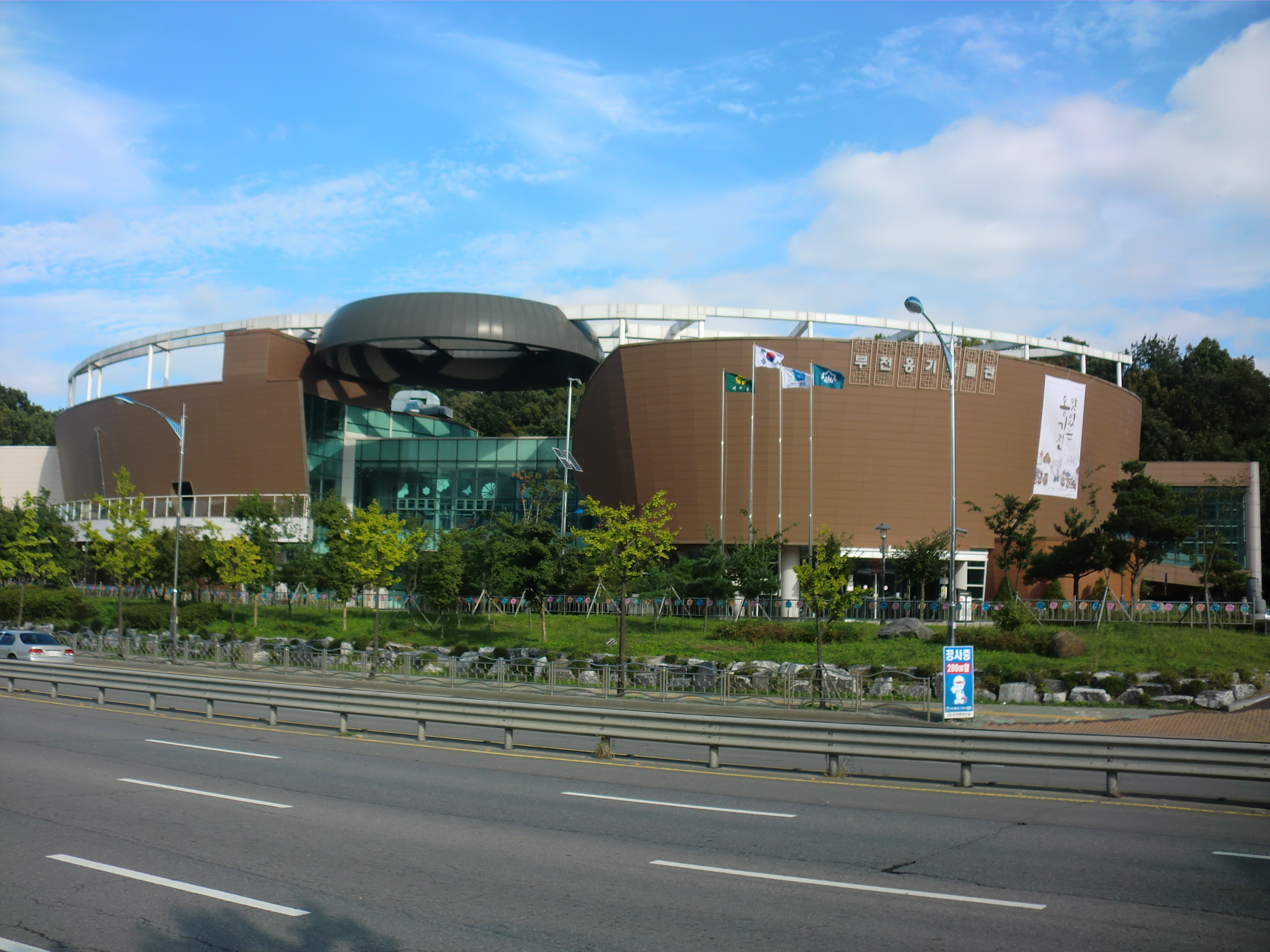 경기도 부천시에 있는 부천옹기박물관